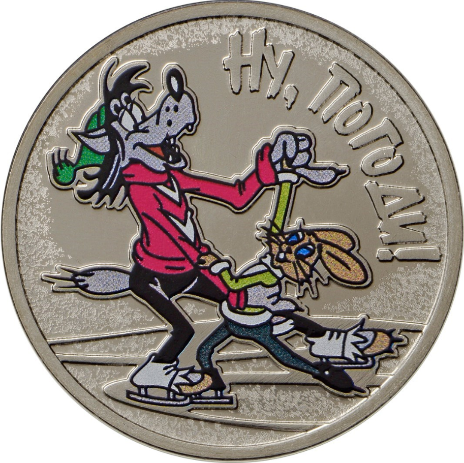 Монета Банка России. 25 рублей, реверс, анциркулейтед. Медно-никелевый сплав. Серия: Российская (советская) мультипликация: «Ну, погоди!». В специальном исполнении. Художник: А.А. Брынза. Скульптор: М.П. Титов. Московский монетный двор.